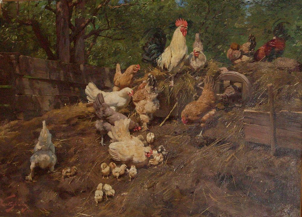 Baromfiudvar. Vastagh Géza festménye.